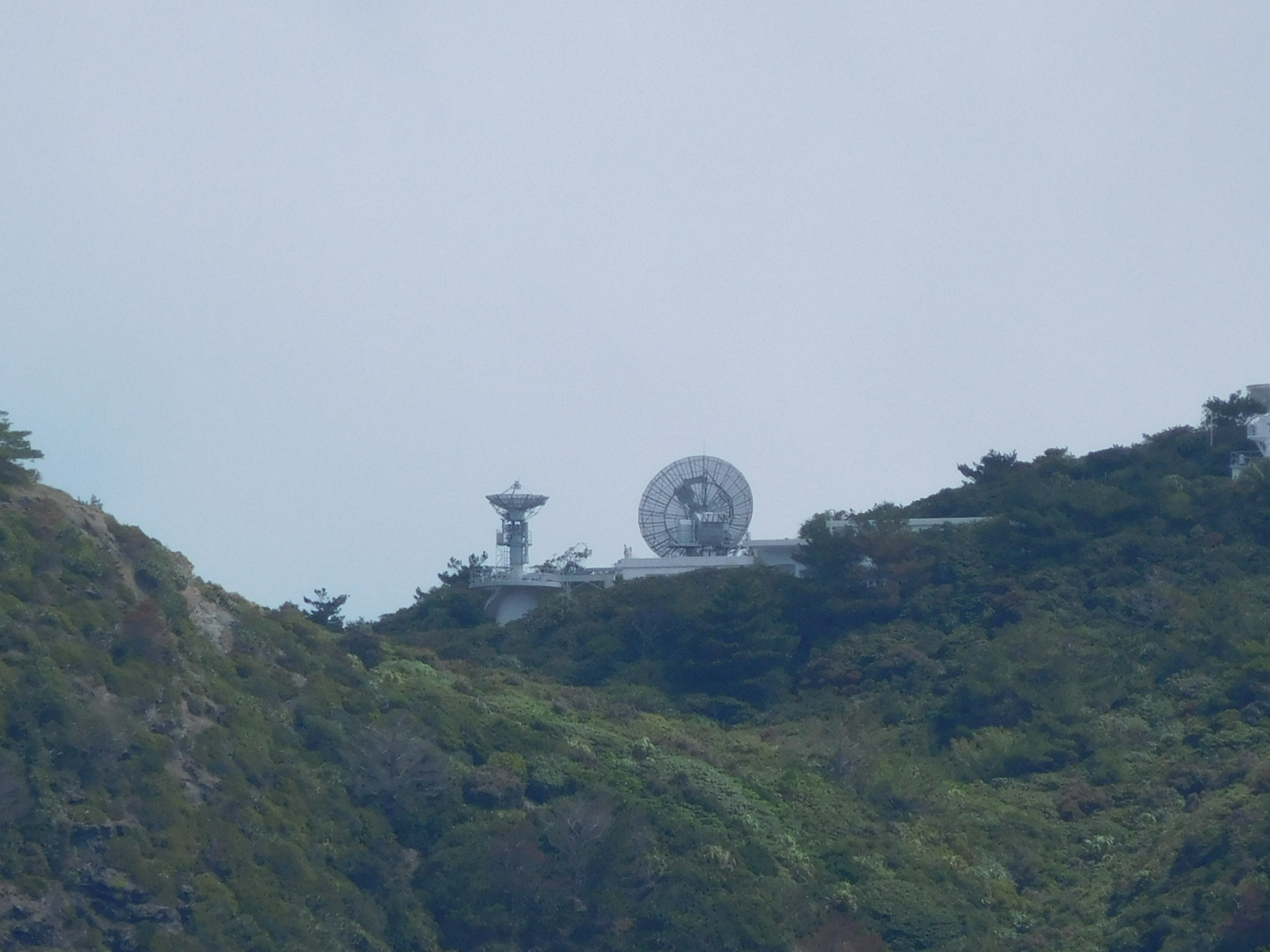 小笠原追跡所 20160921撮影 二見港から